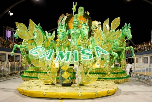 Carro alegórico Camisa Verde e Branco - Carnaval São Paulo 2010.